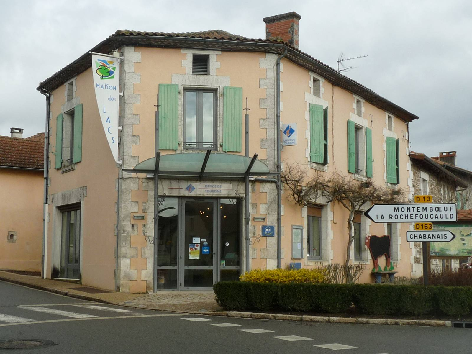 office du tourisme de Massignac, Charente, France